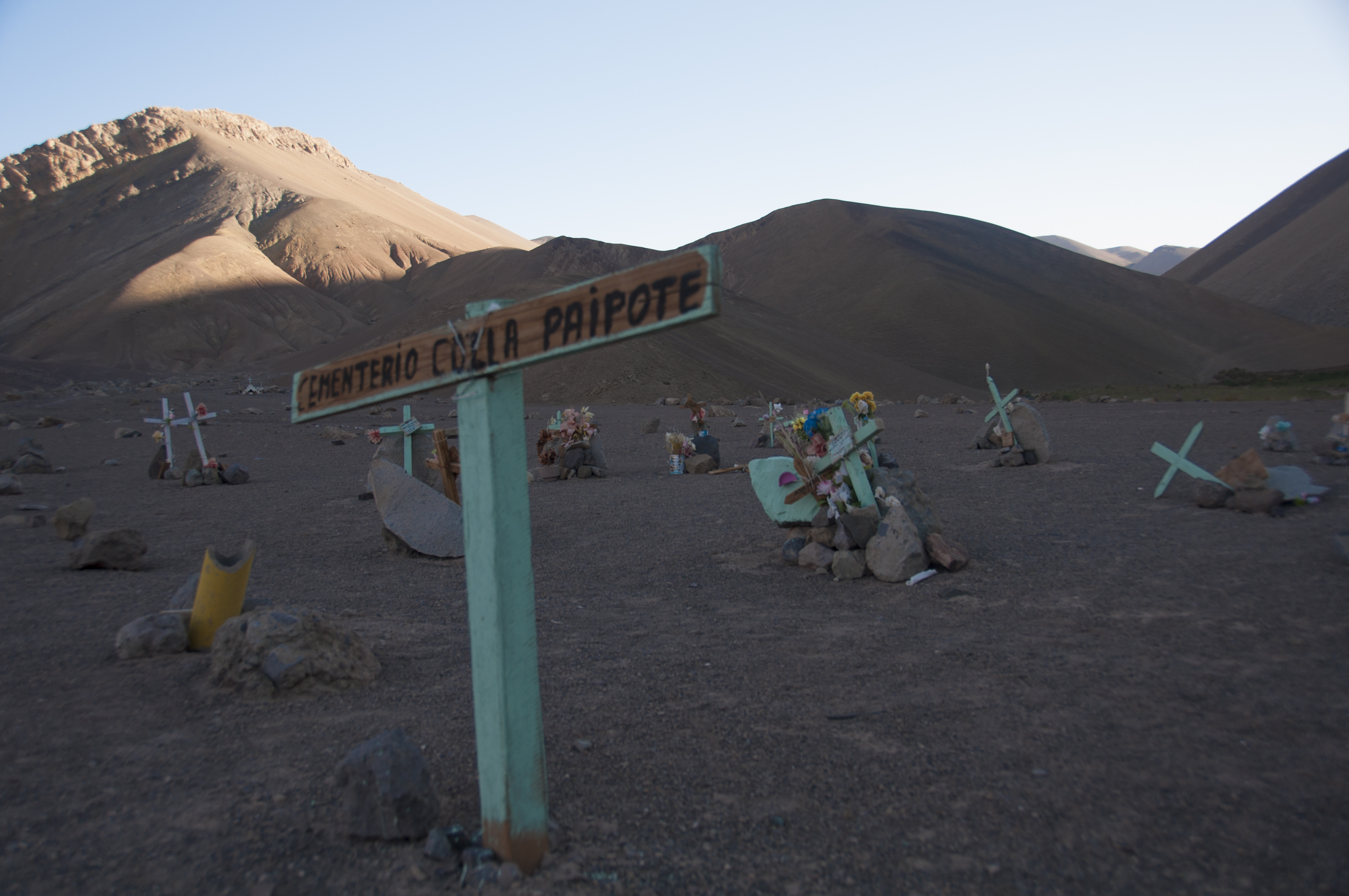 Cementerio Indígena Colla, ubicado al interior de la Región de Atacama